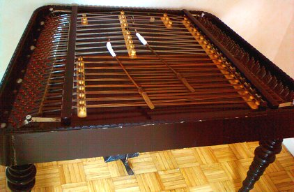 Grand cymbalum (ou cymbalum de concert) provenant de Roumanie